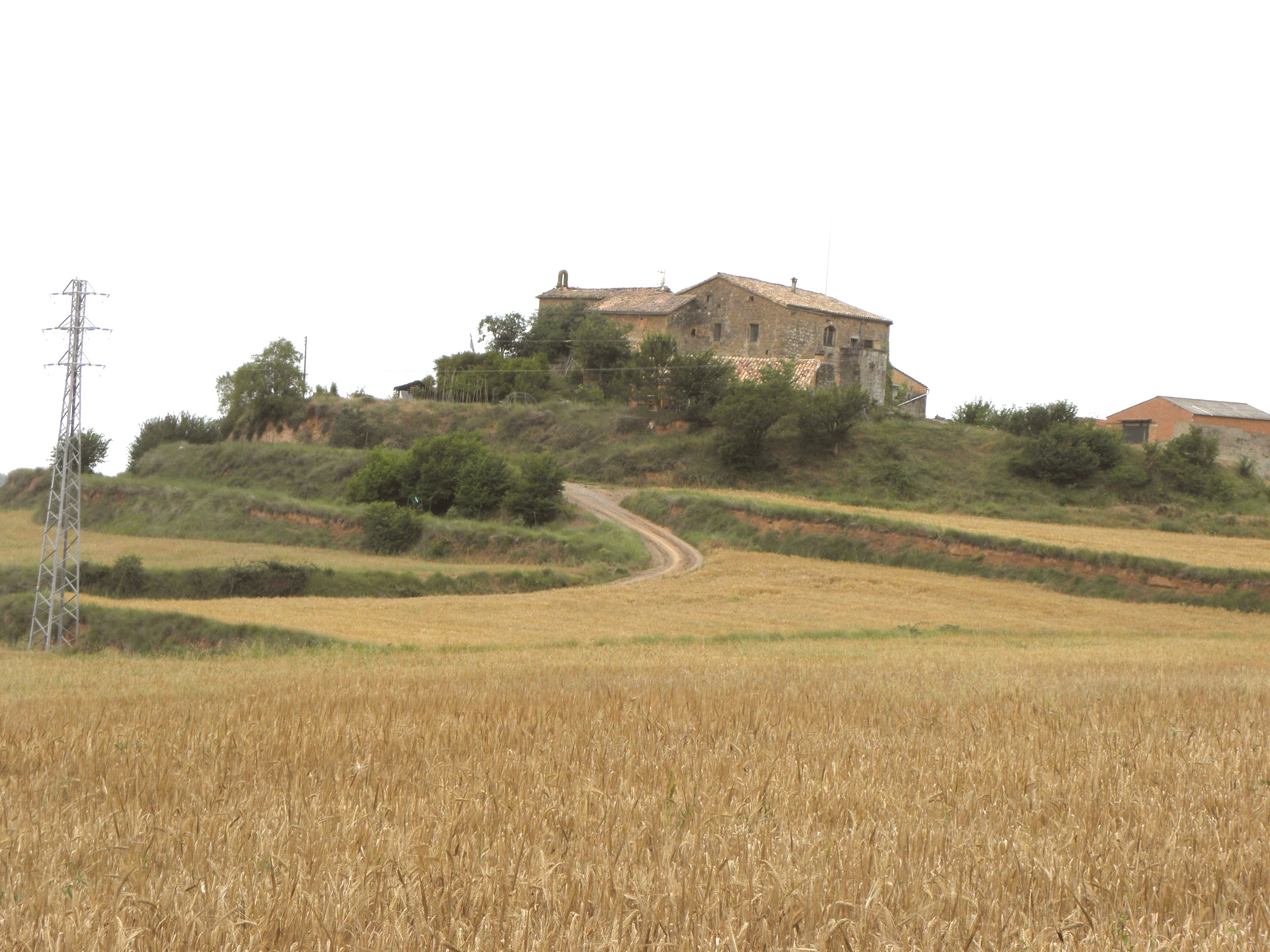 Vista des de llevant